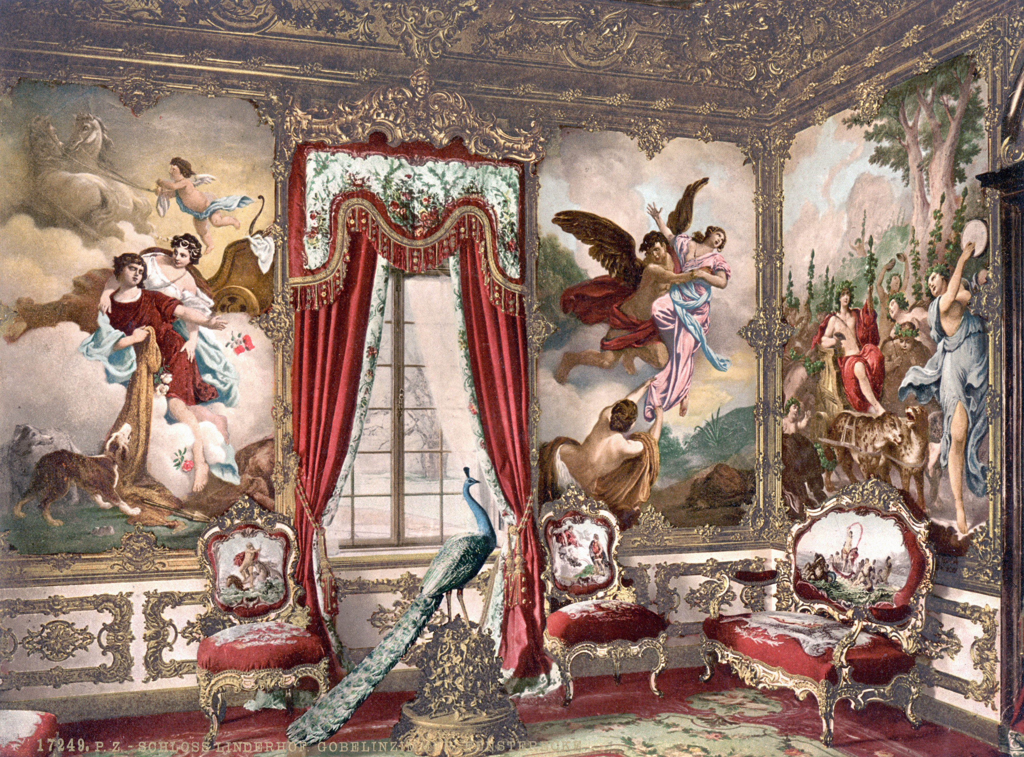 Nach François Boucher (französisch, 1703-1770): Gobelinimitation ca. 1900 (?), Malerei auf Leinwand, Deutschland, Schloss Linderhof, so genanntes Östliches Gobelinzimmer (nach 1874?).